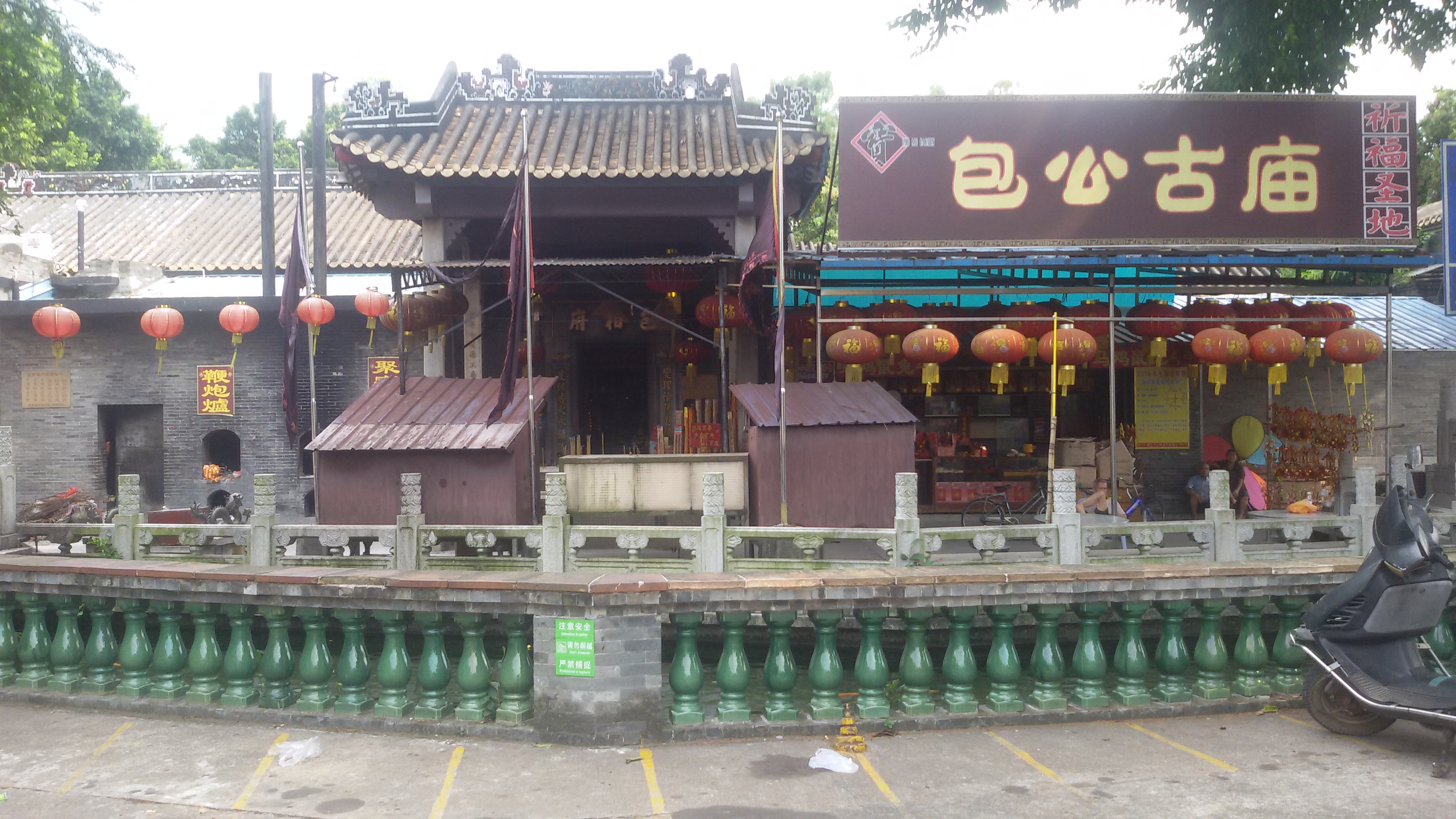 粵語: 番禺 寶墨園外 包相府